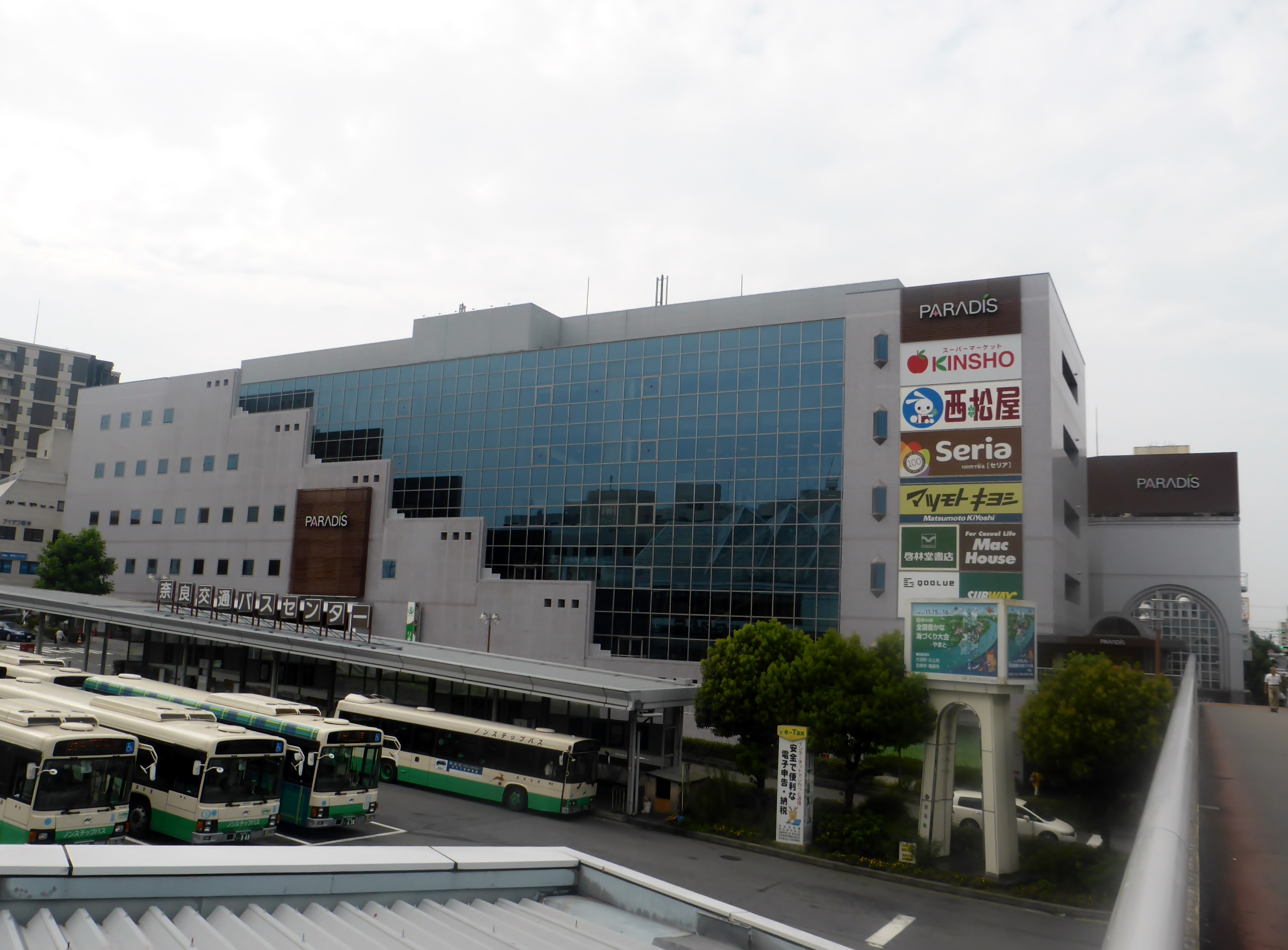 パラディ学園前を撮影